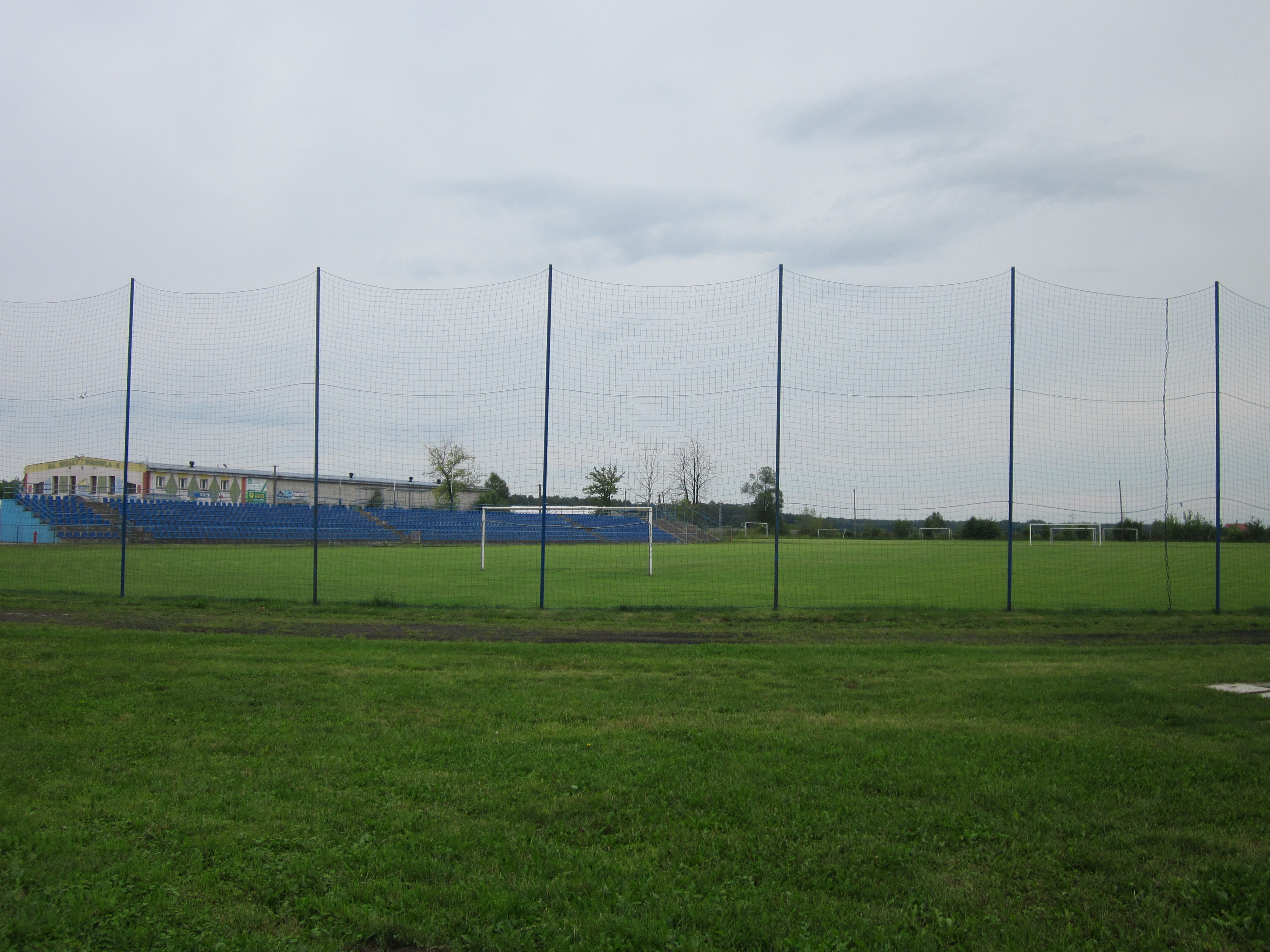 Stadion ten znajduje się przy ul. 1-go Maja . Użytkownikiem tego terenu jest klub piłkarski „Ruch Wysokie Mazowieckie”.